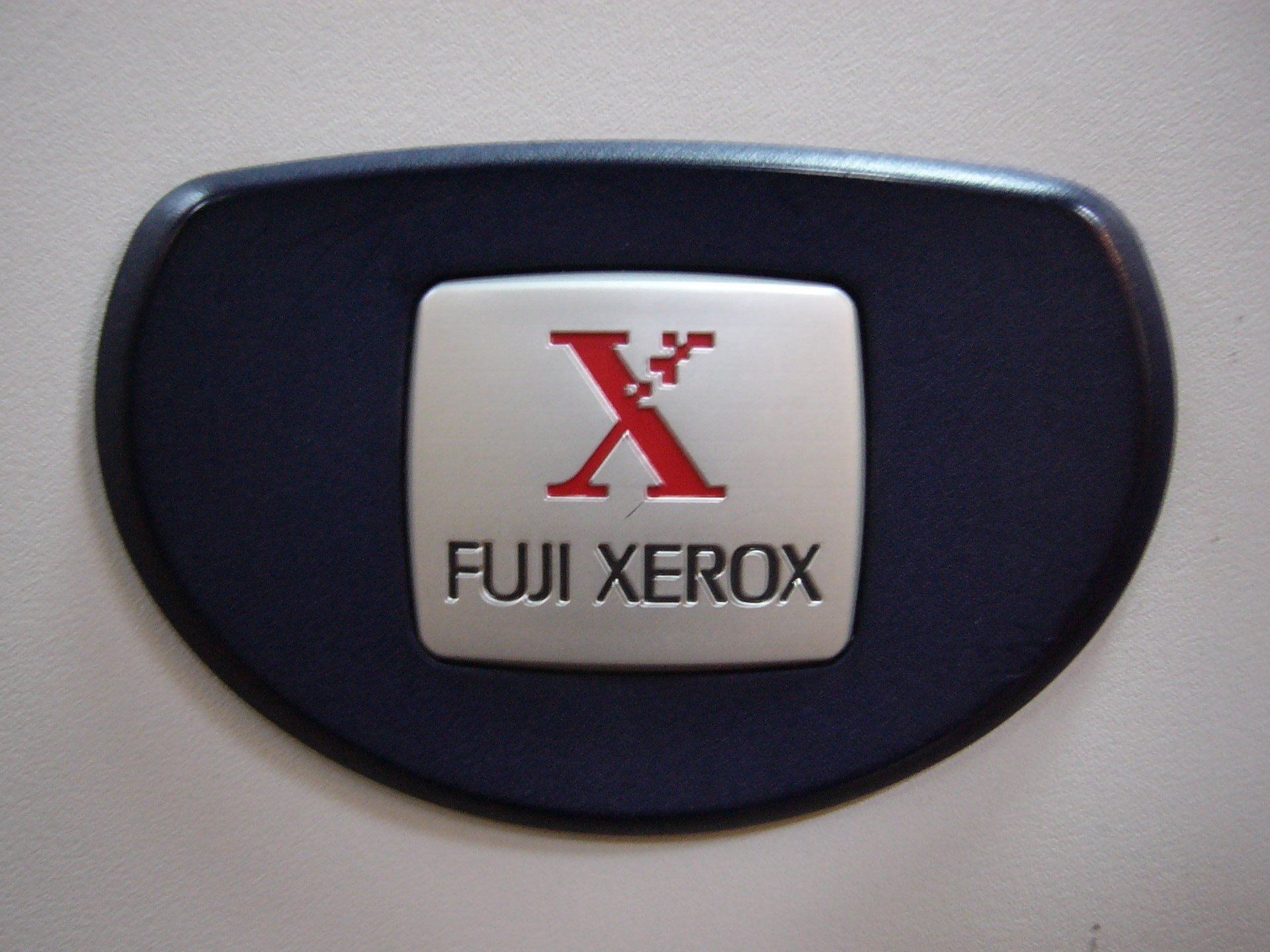 富士全錄Document Centre 505影印機側面的當時富士全錄商標